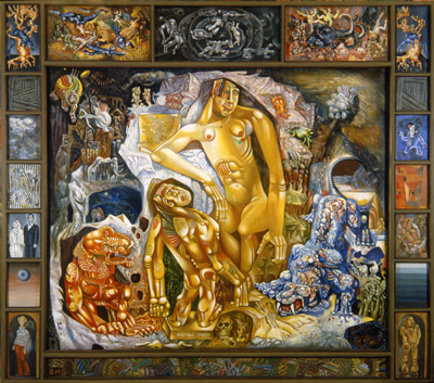 Миша Брусиловский. Homo sapiens. Холст, масло. 125х135. 1973 год.